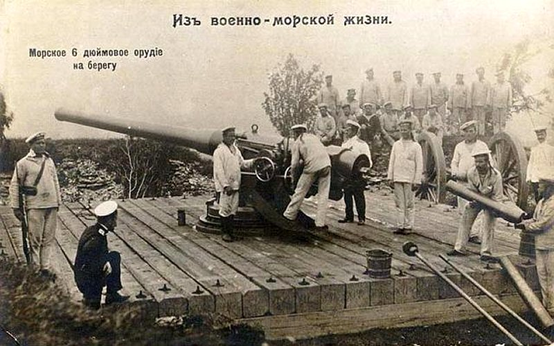 Открытая морская батарея с 152мм орудием Канэ на деревянной платформе. Морская Крепость имени Императора Петра Великого, 1916-1917 гг.